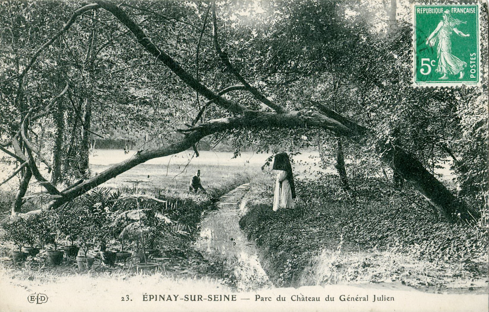 Carte postale ancienne éditée par ELD, N°23Épinay-sur-Seine - Parc du château du Général JulienVue du Ru d'Enghien, qui reccueille les eaux du Lac d'Enghien. Ce ru, qui se rejettait en Seine à Épinay-sur-Seine, est désormais busé et intégré dans le réseau d'égouts géré par les services départementaux de Seine-Saint-Denis et Interdépartementaux du SIAAP